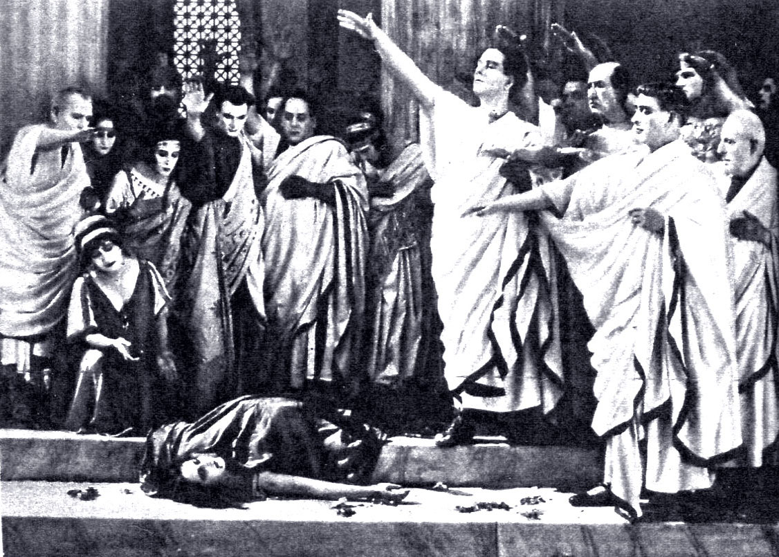 Scena finale del film:l'uccisione di "Messalina" (Guazzoni, 1923)